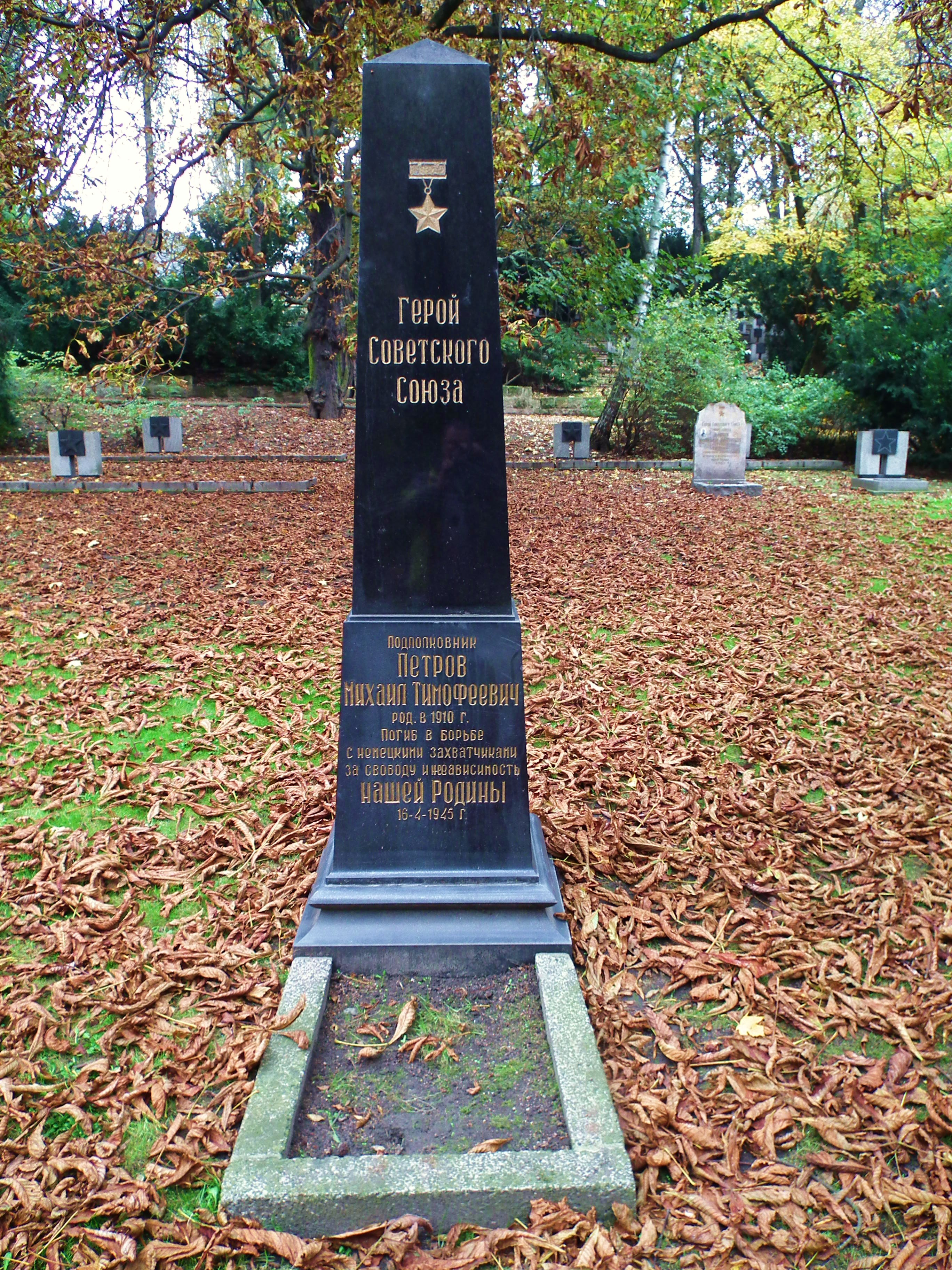 Grób sowieckiego żołnierza - Michail Timofiejewicz Pietrow, bohater ZSRR. Cytadela, Poznań, cmentarz sowiecki.